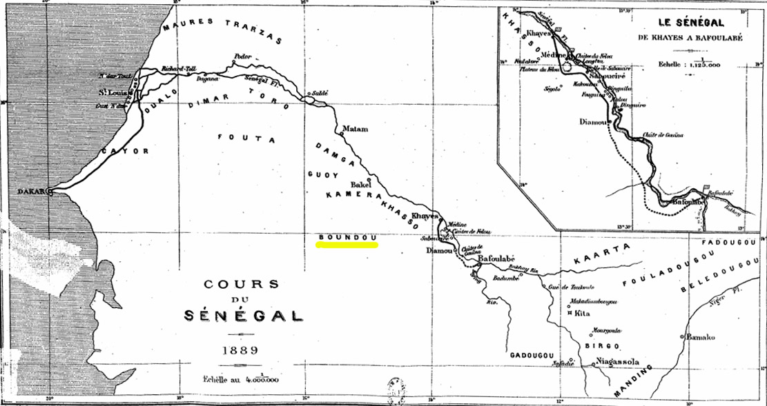 Localisation du Boundou sur une carte du fleuve Sénégal (1889) dans Eugène Béchet, Cinq Ans de séjour au Soudan français, E. Plon, Nourrit, Paris, 1889, après la page 270